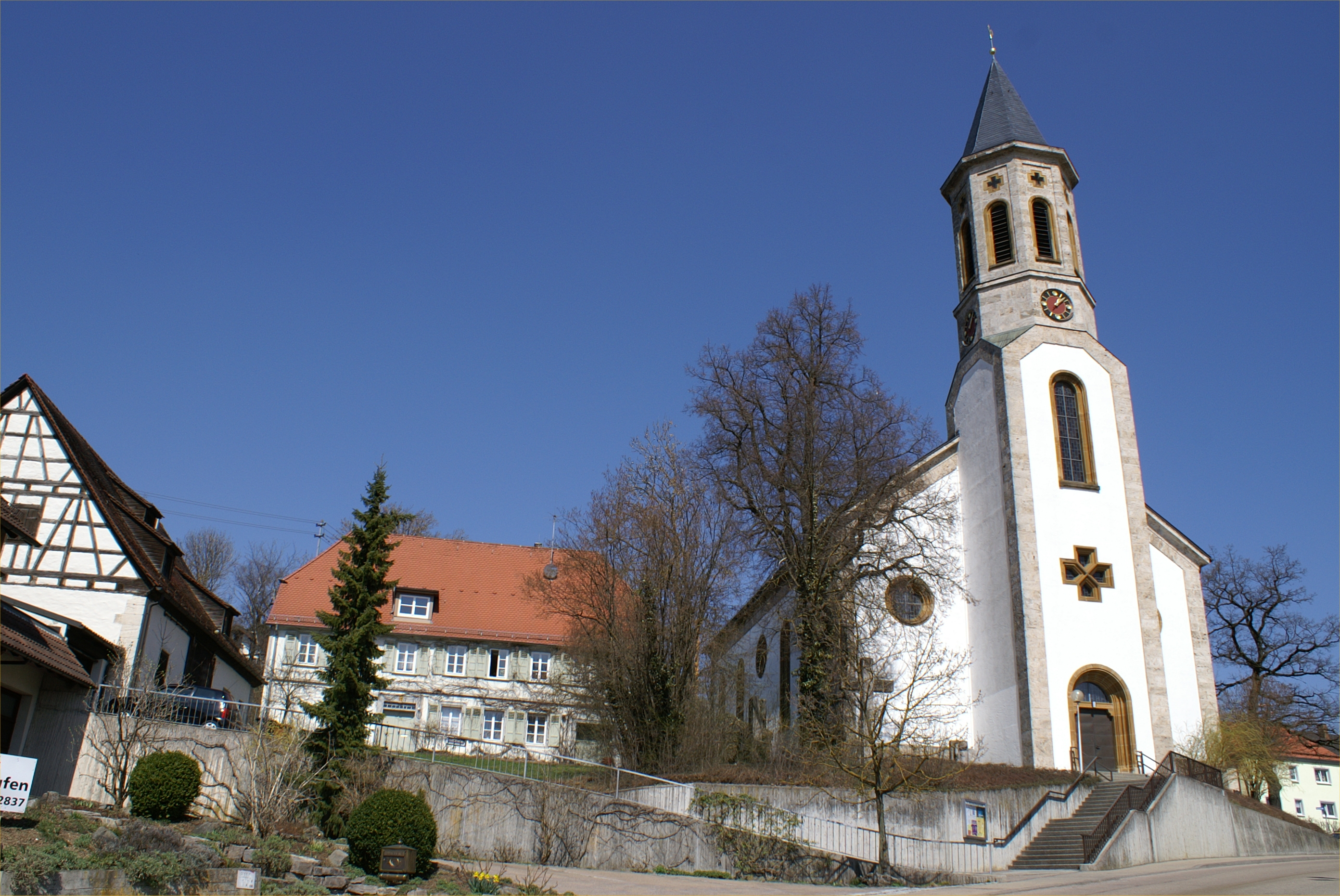 Martinskirche Söhnstetten (rechts). In der Mitte das evang. Pfarrhaus. Ansicht von Süden